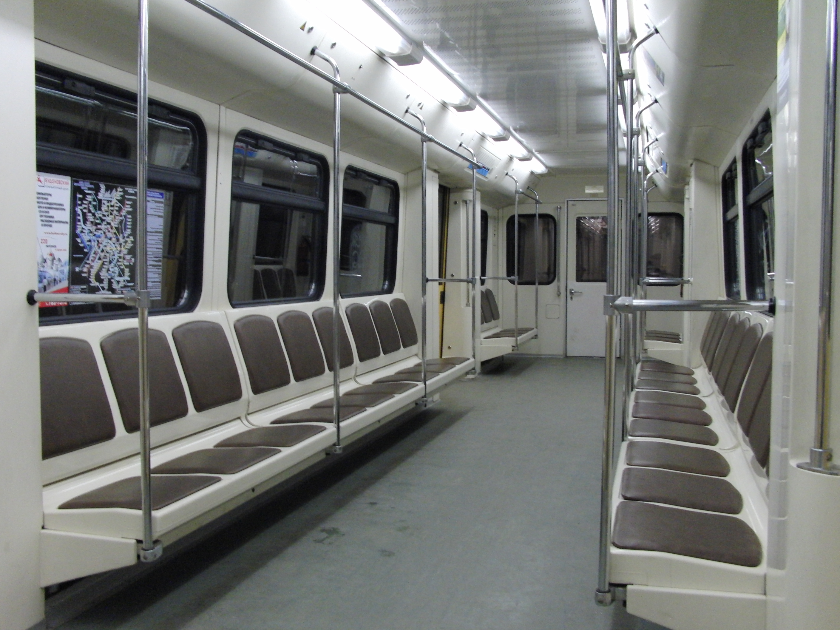 Rusich metro car of Filyovskaya line (Метровагон Русич Филёвской линии)